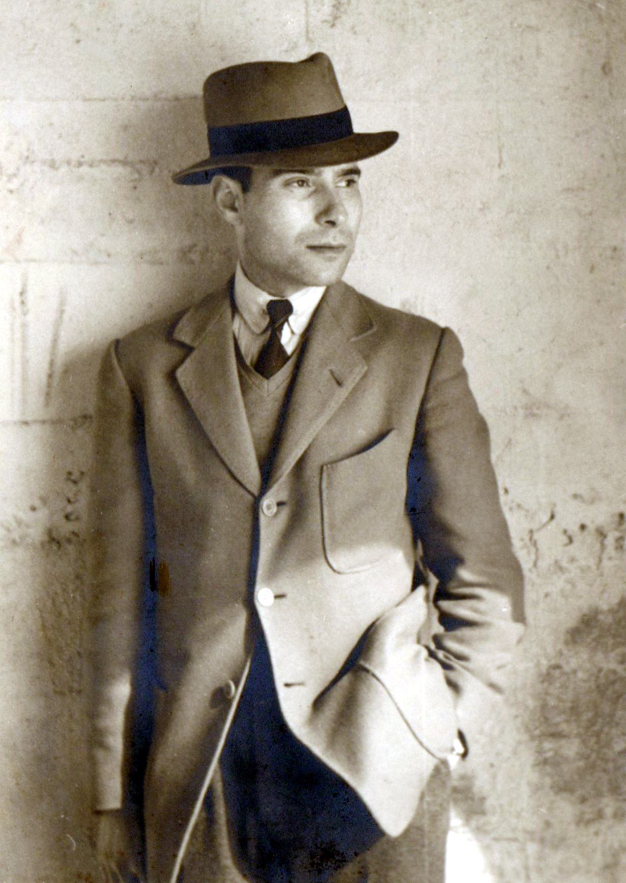 Basilio Fernández en su juventud